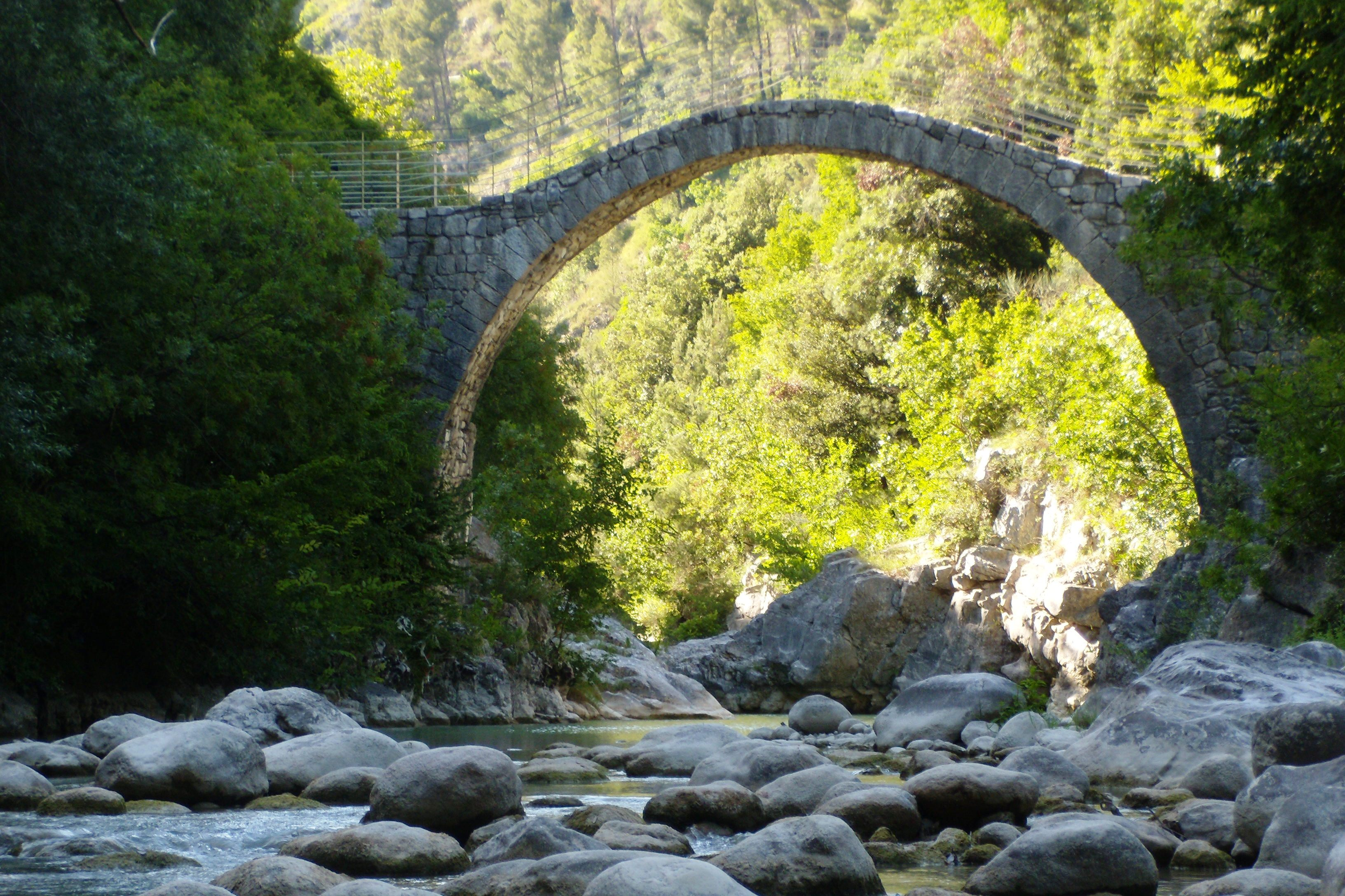 Scorcio del Ponte romano di Annibale in Cerreto Sannita (Bn).